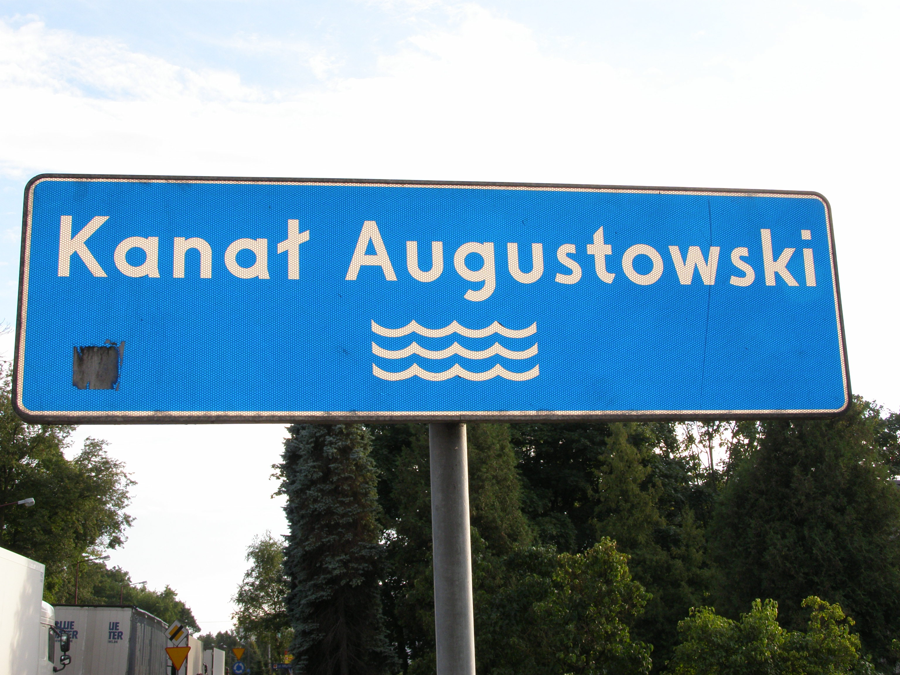 Kanał Augustowski - znak drogowy w Augustowie